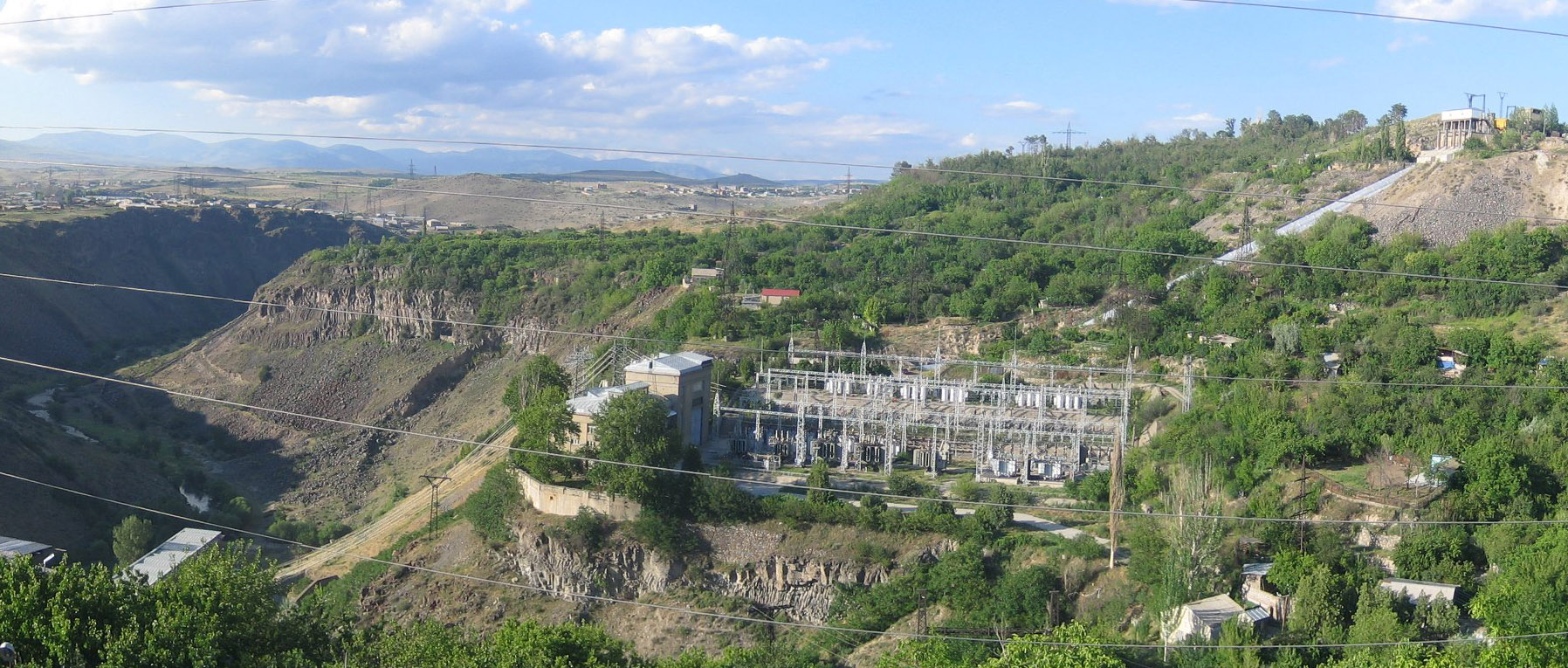 Канакерская ГЭС